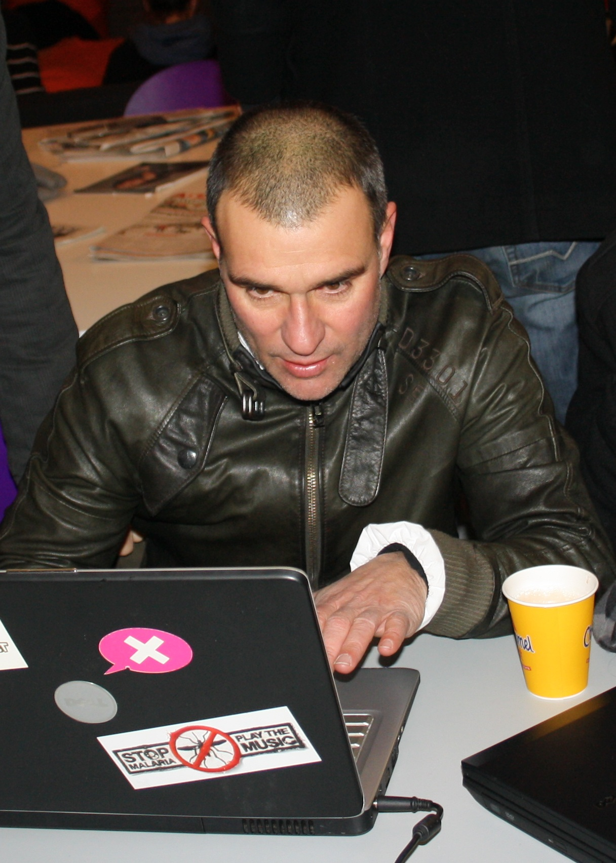 Cabaretier en acteur Viggo Waas